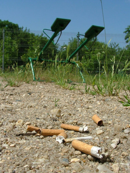 Cigarettes, papierosy